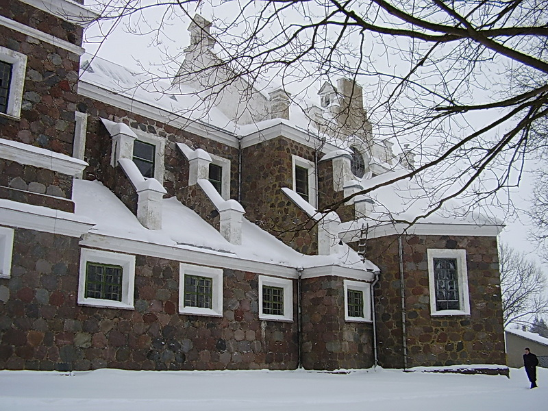 Радунь. Касцёл Маці Божай Ружанцовай